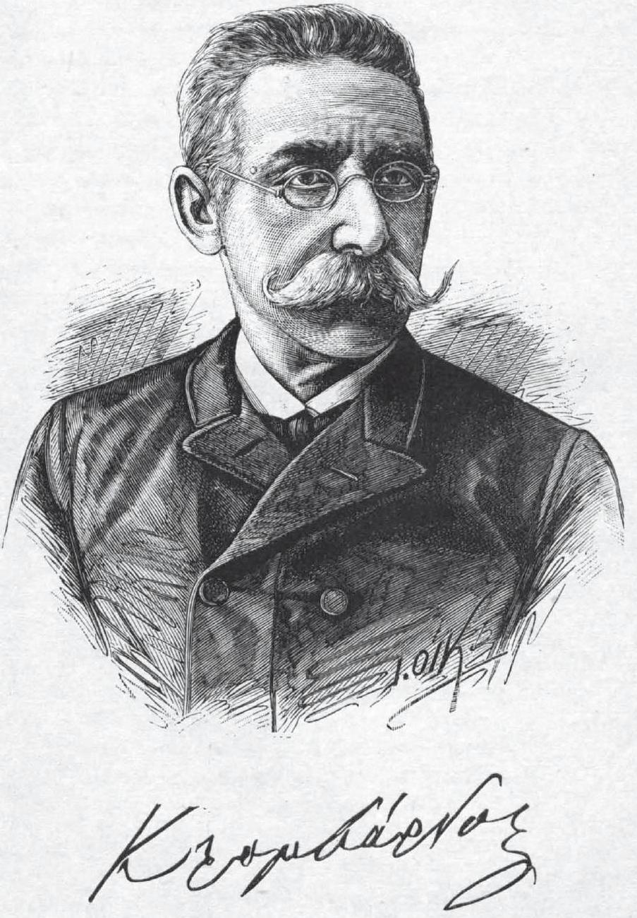 griechischer Politiker, 19. Jahrhundert